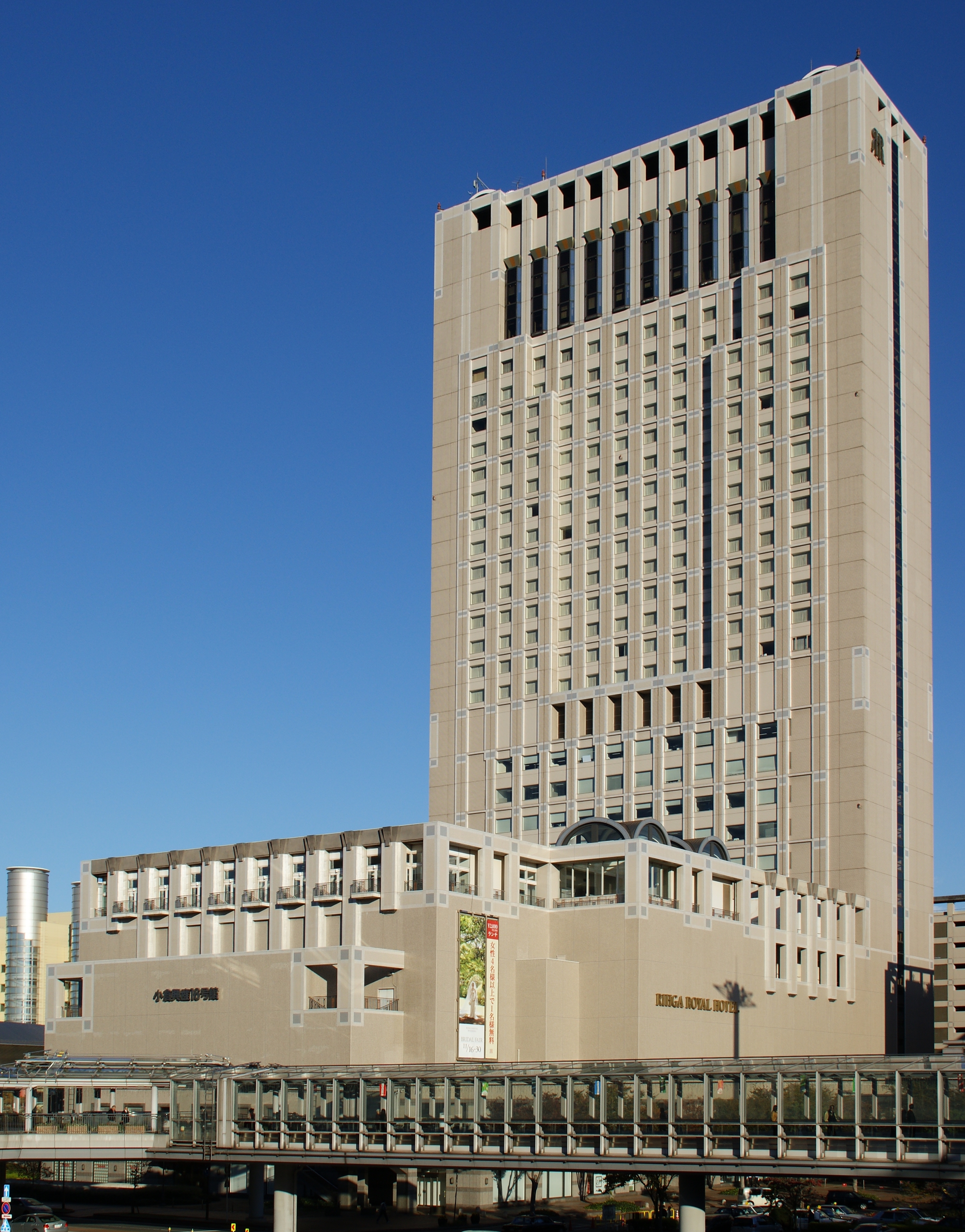 RIHGA Royal Hotel Kokura.(Kokura-Kita Ward, Kitakyushu City, Fukuoka Prefecture, Japan)